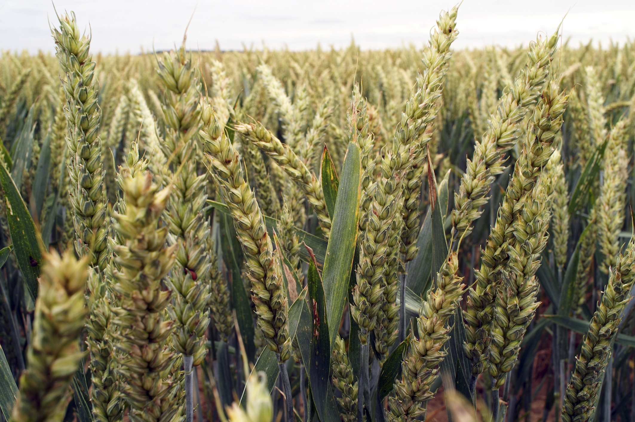 INRA, Jean Weber